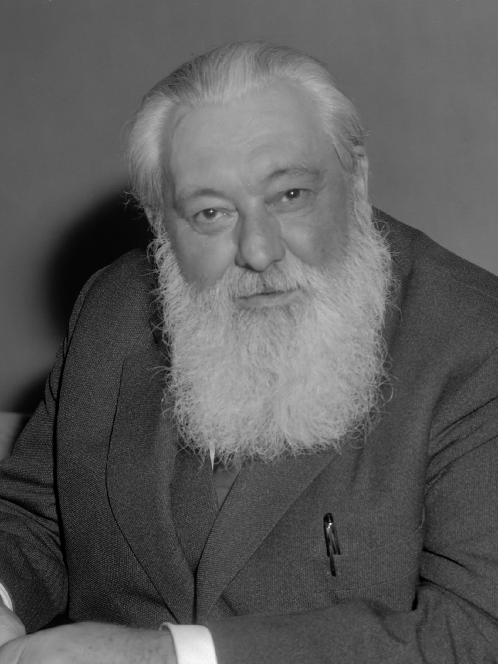 Dr. Frans Hemerijckx op doorreis op Schiphol, hier tijdens persconferentie, dr. Frans Hemerijckx (kop) 14 oktober 1964